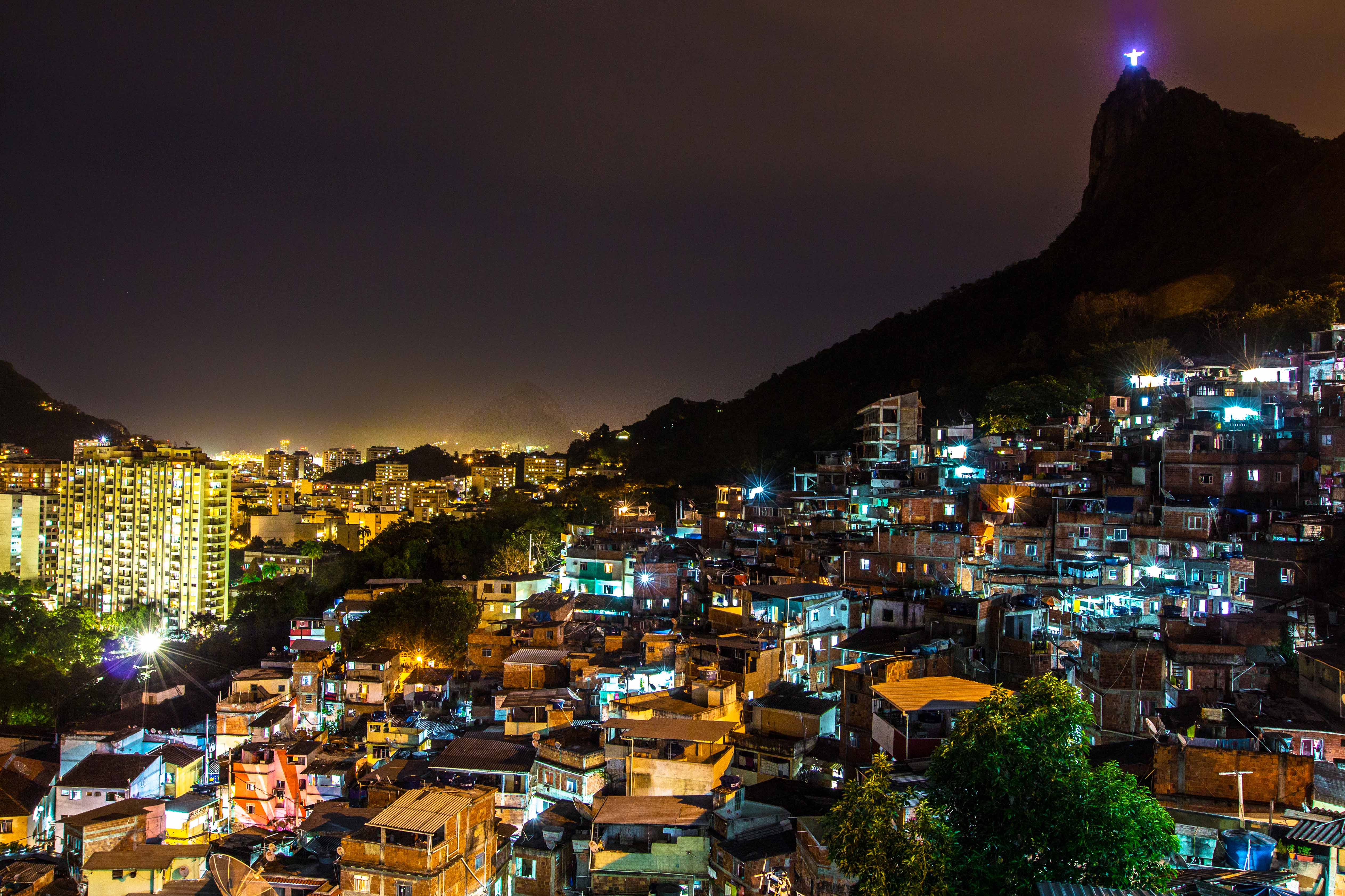 Foto feita na Favela de Santa Marta, RJ